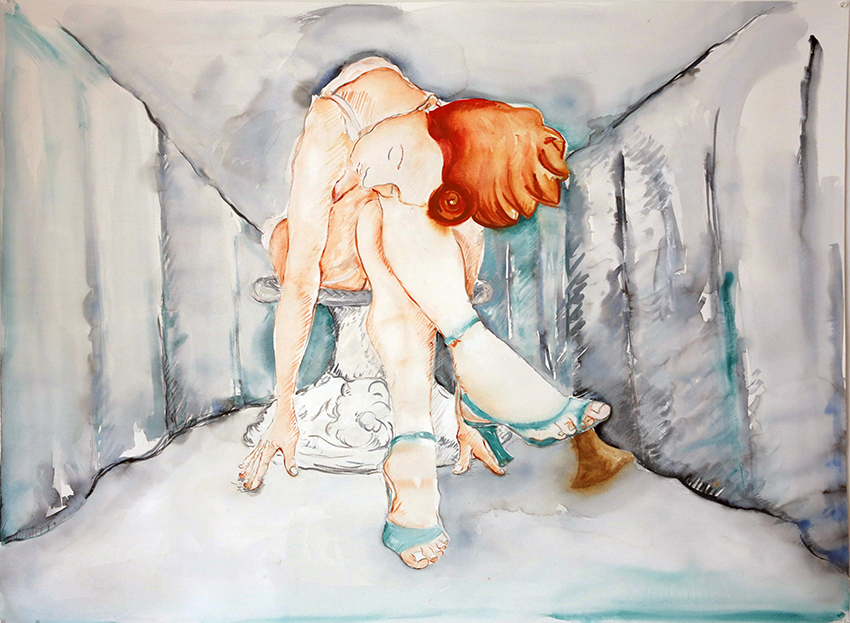 De la serie pintando la imagen-movimiento